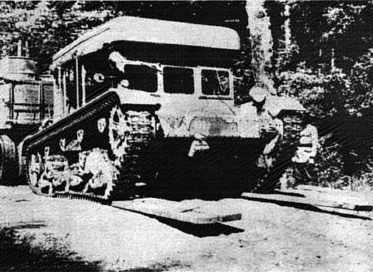 Pierwszy prototyp ciągnika C6P (z silnikiem umieszczonym z tyłu oraz kołami napędowymi z przodu), już po przebudowie dokonanej w wyniku prób w 1934 roku. Ciągnik ten miał numer 8393 (od 1938 roku numer W-08-393) i nosił oznaczenie C7P/I, a przez obsługę nazwany został "Felek". Aż do wybuchu II wojny światowej znajdował się w BBT Br. Panc. (głównie w Warsztacie Doświadczalnym w Ursusie) i służył do różnych doświadczeń i prób. [opis oryginalny]